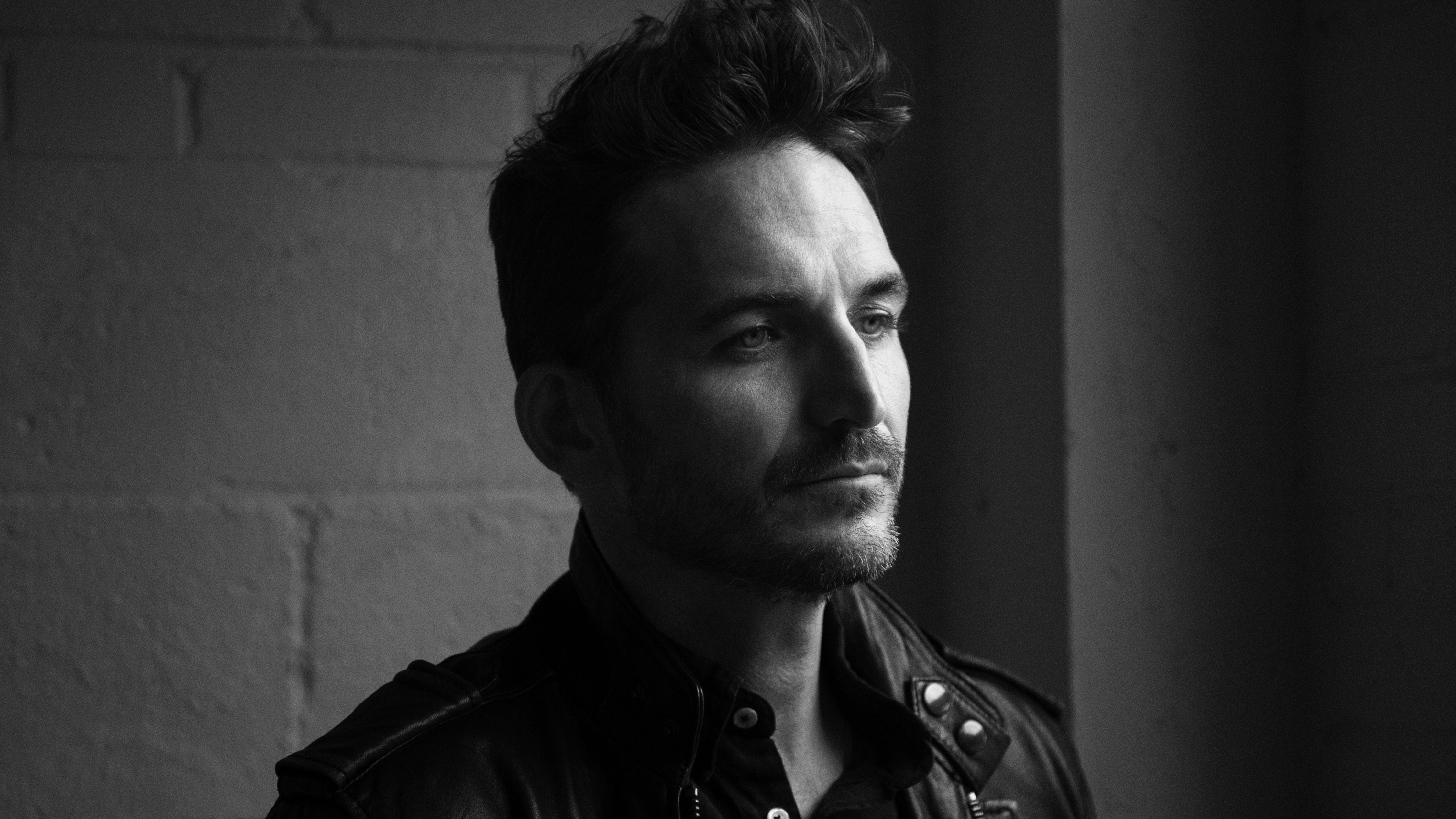 François Delisle